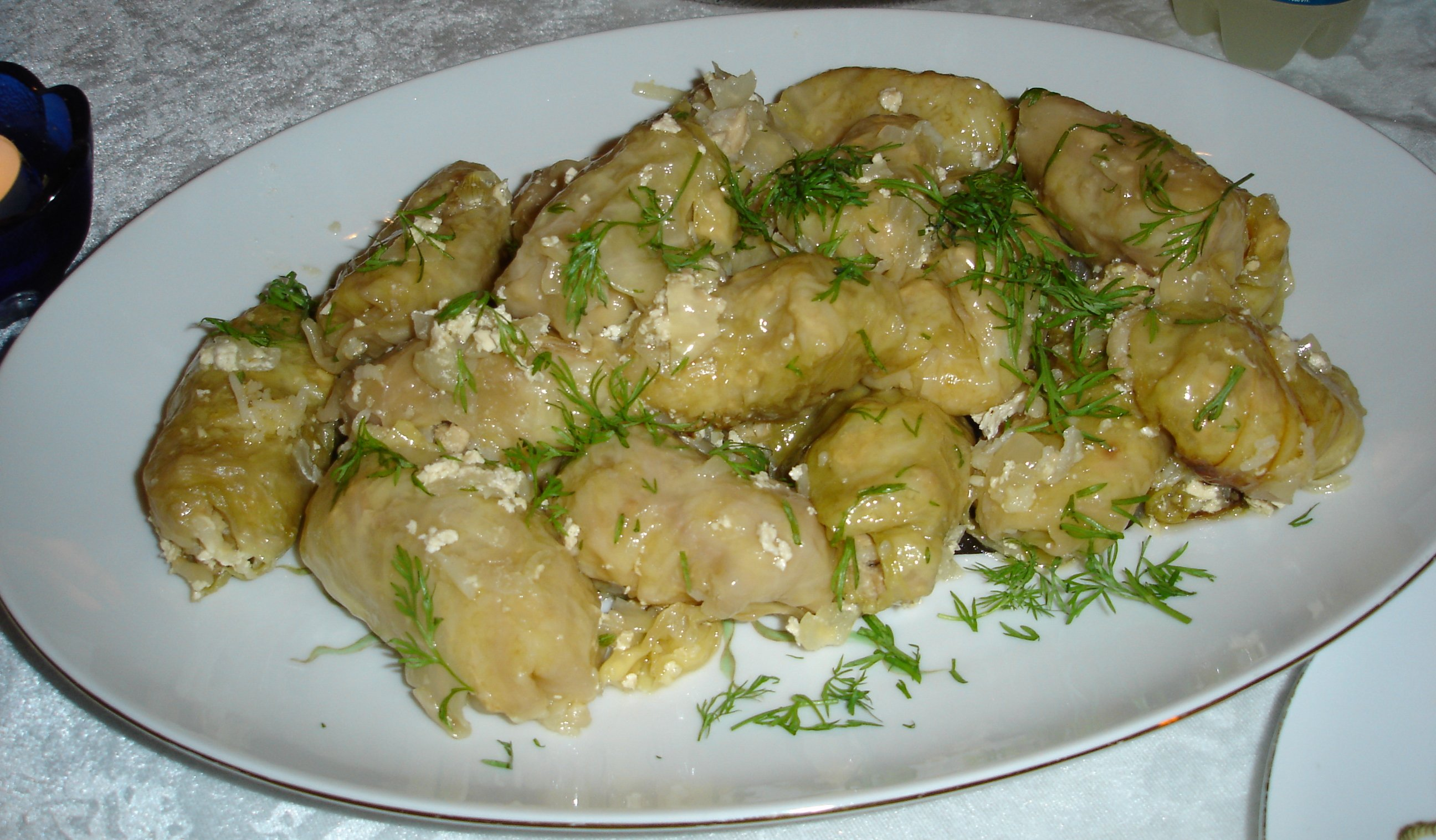 Sarmale– Kohlrouladen aus gesäuerten Weißkohl- oder Weinblättern